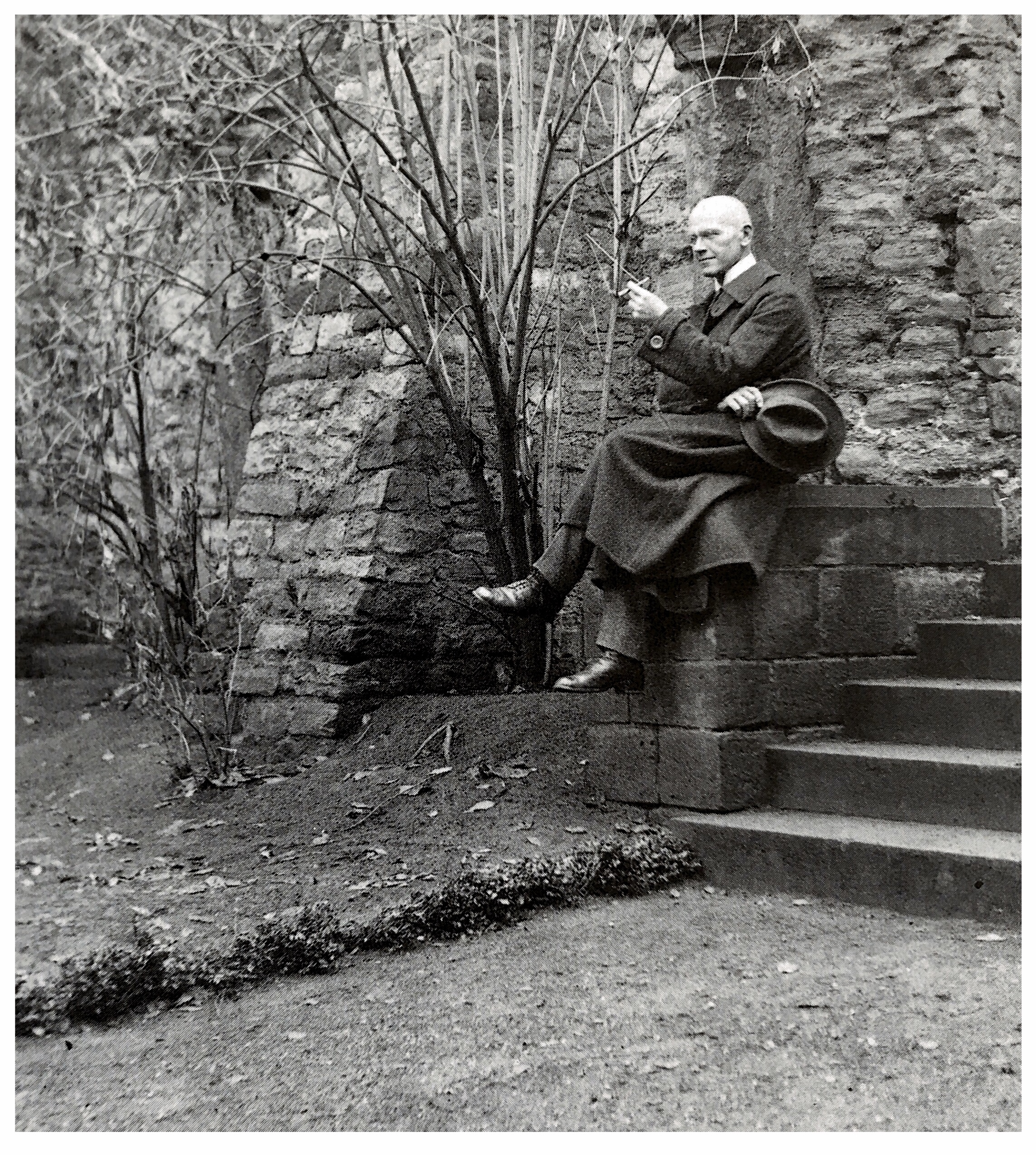 Hans Güldenpfennig, königlicher Regierungsbaumeister im Regierungspräsidium Merseburg, Dienstort Schulpforta